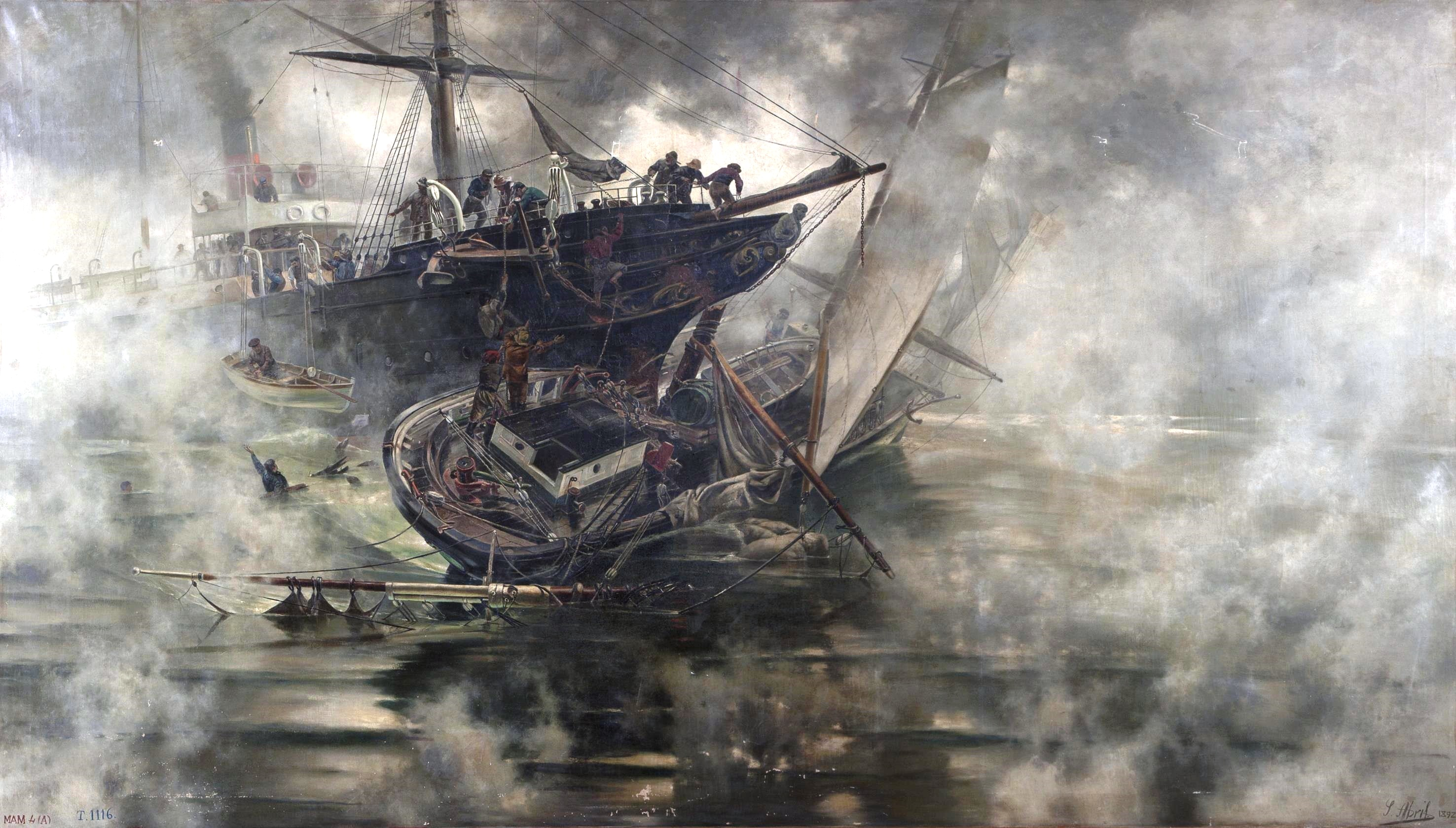 La obra representa una colisión o choque entre dos barcos.